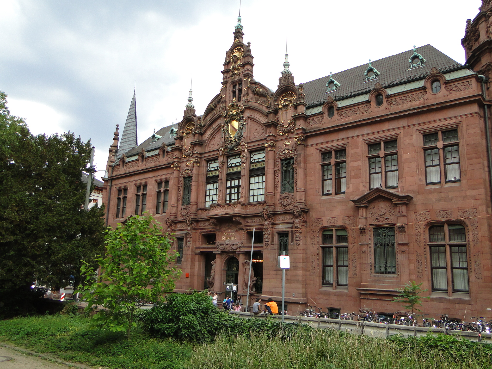 Heidelberg